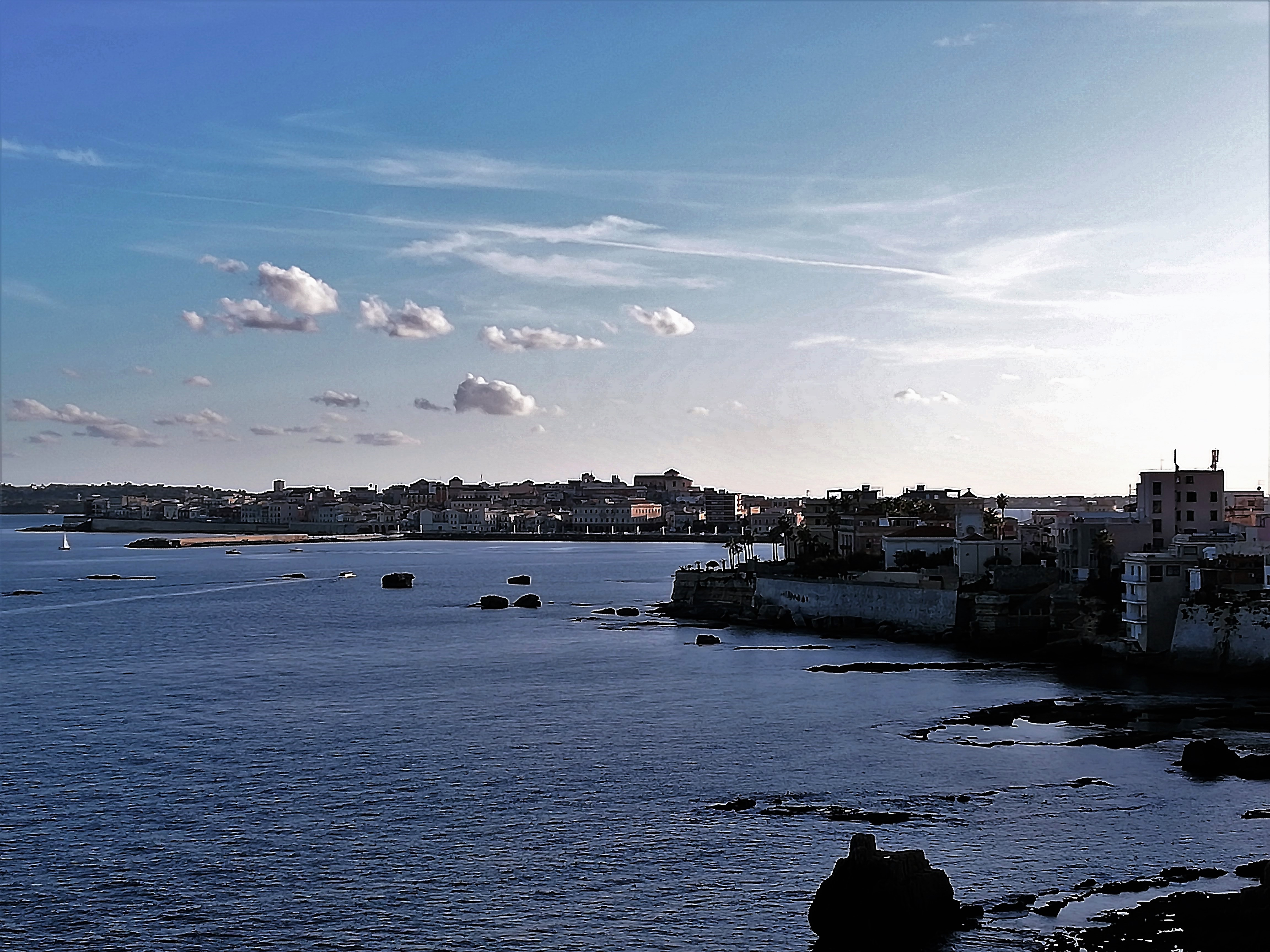 La posizione dominante del complesso dei Gesuiti nel panorama di Ortigia.